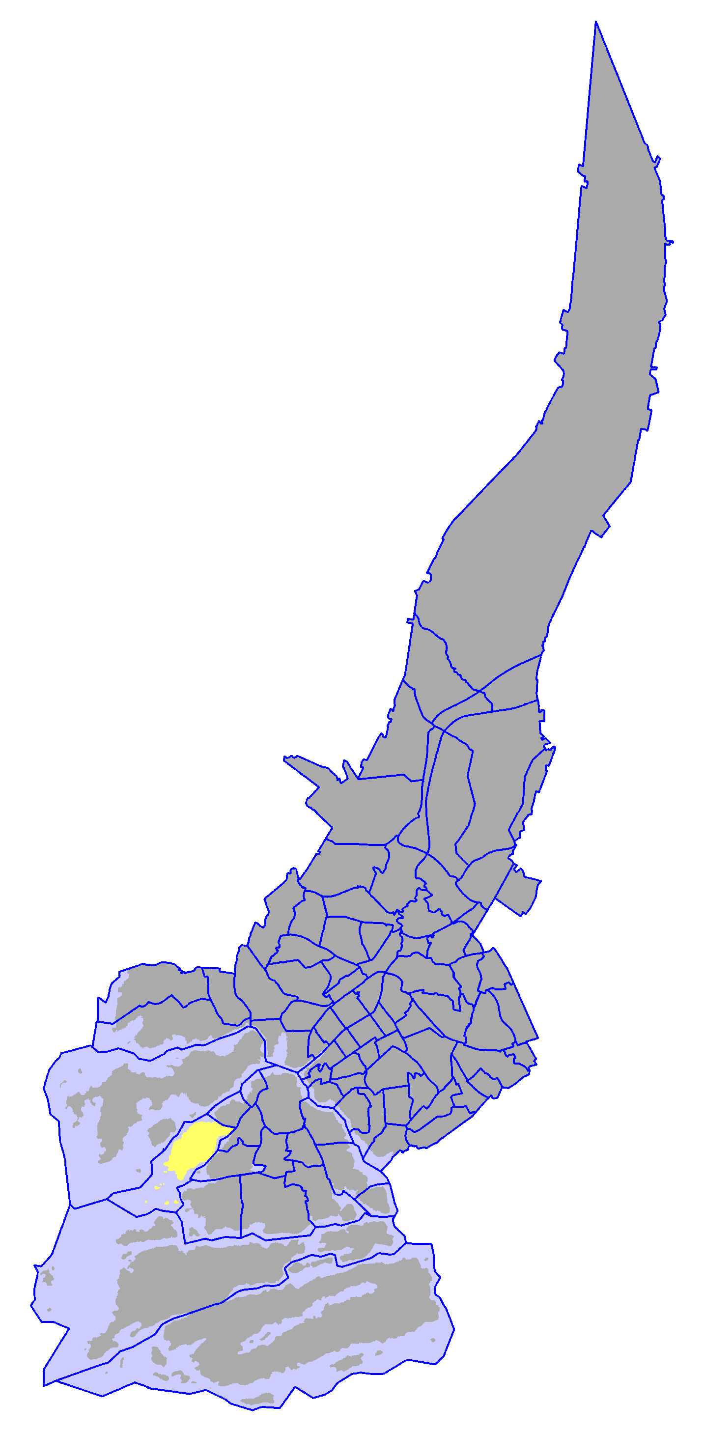 District of Maanpää, in Turku